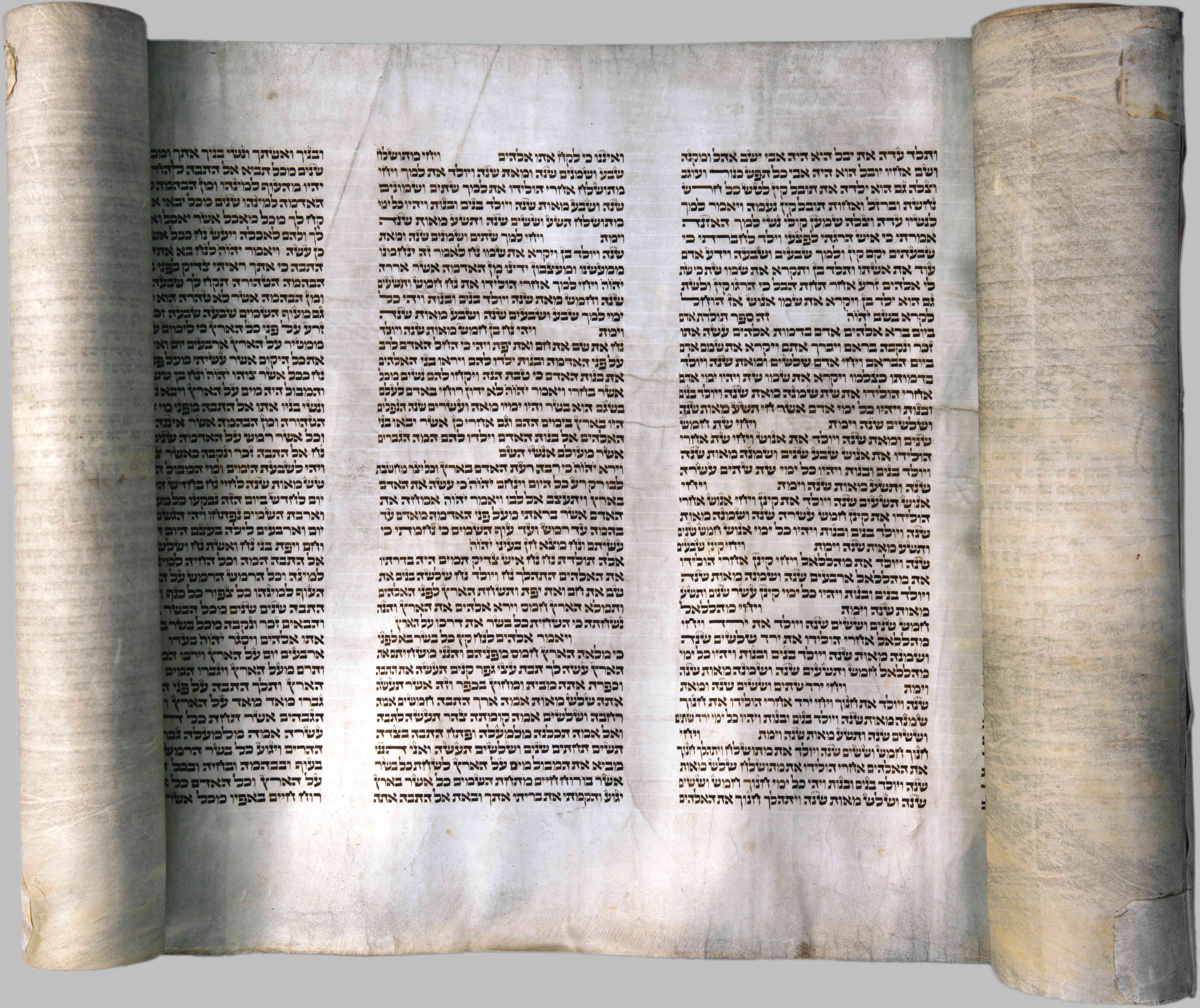 Тора. Нацыянальная бібліятэка Беларусі